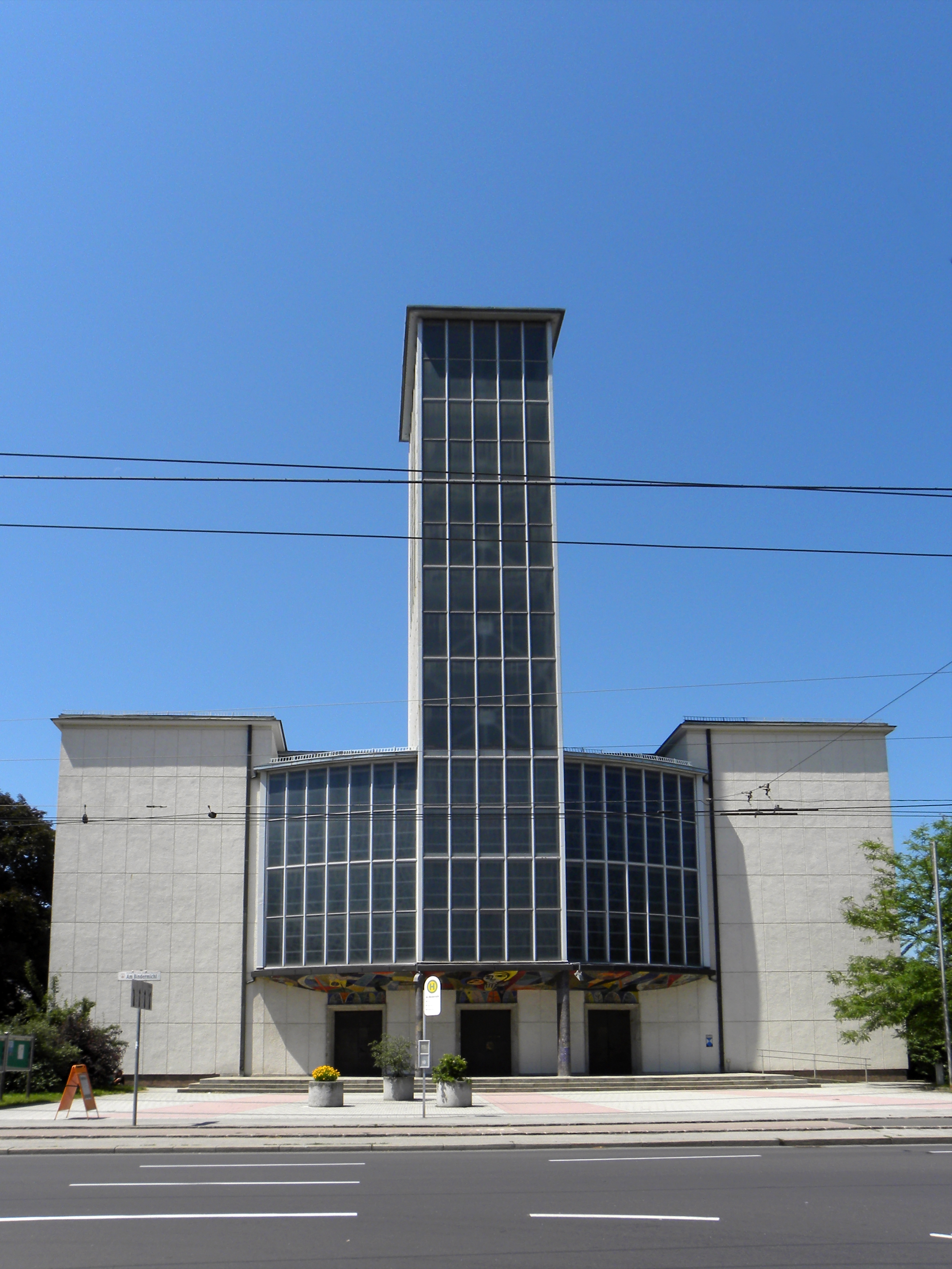 Kath. Pfarrkirche hl. Michael, sog. Bindermichlkirche